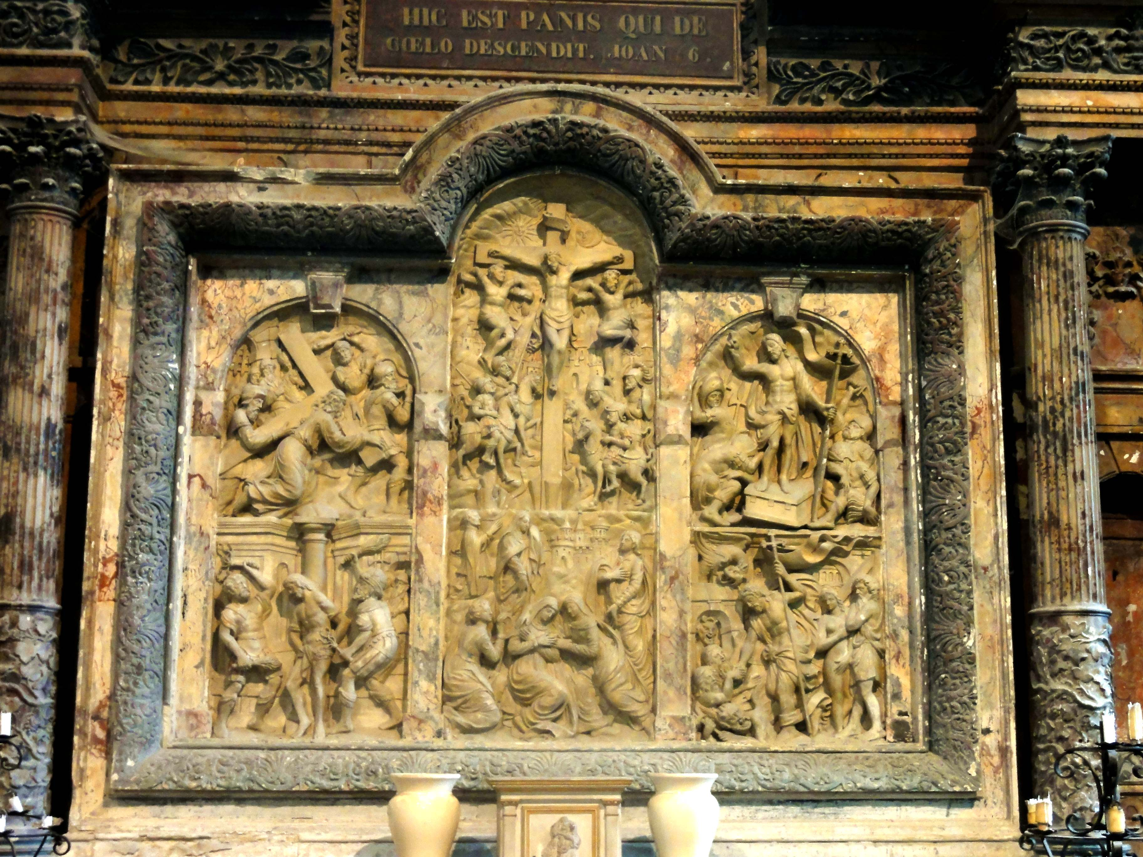 Retable majeur.